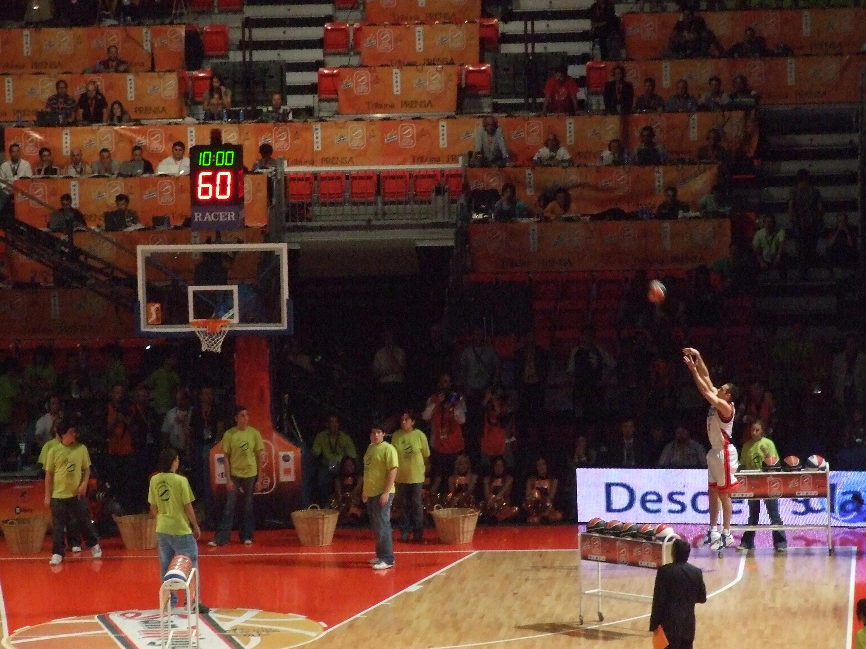 Concurso de triples en la Supercopa de España 2007, Igor Rakocevic.